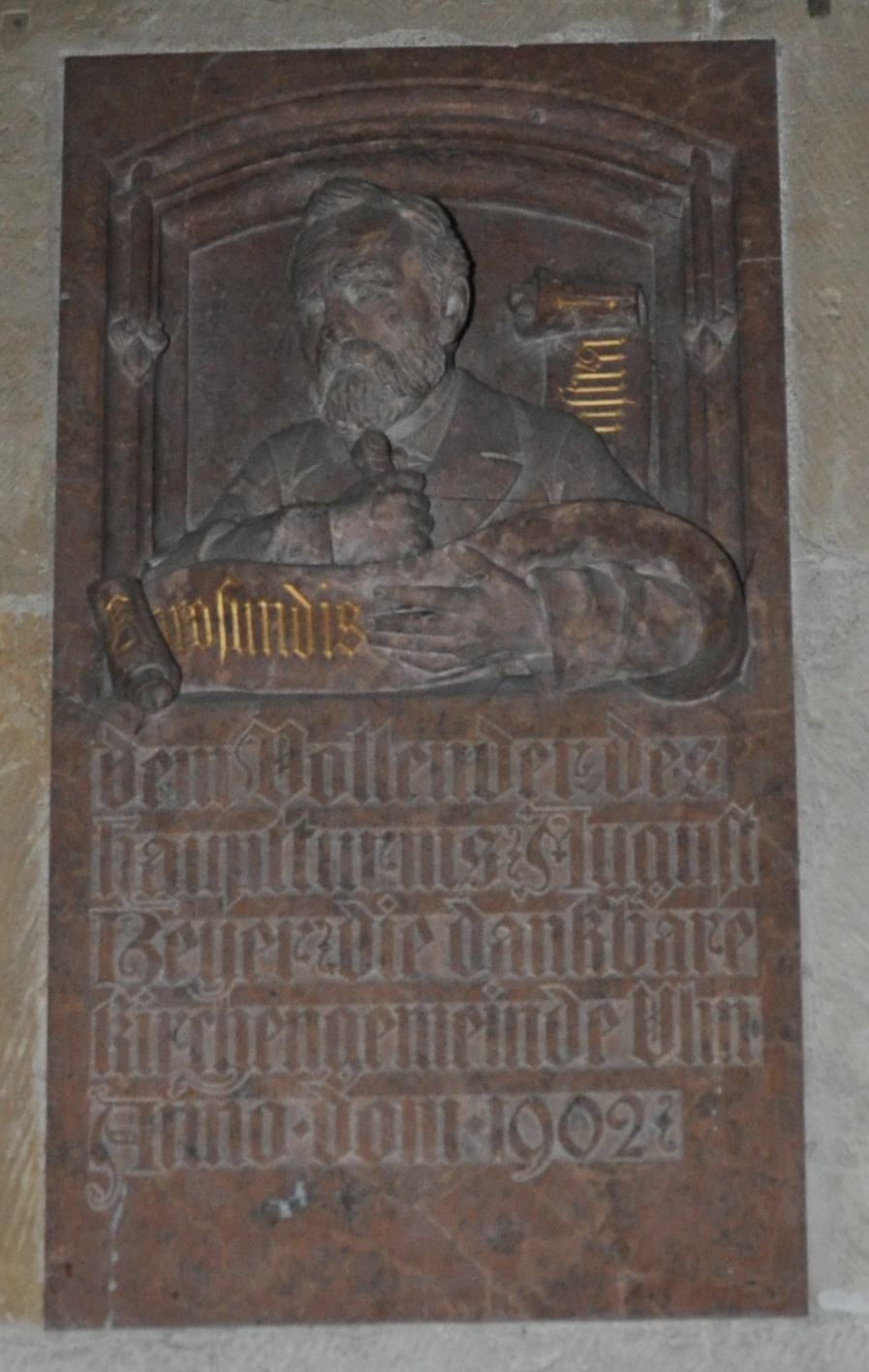 Ulm, Ulmer Münster, Gedenkstein für den Münsterbaumeister August Beyer